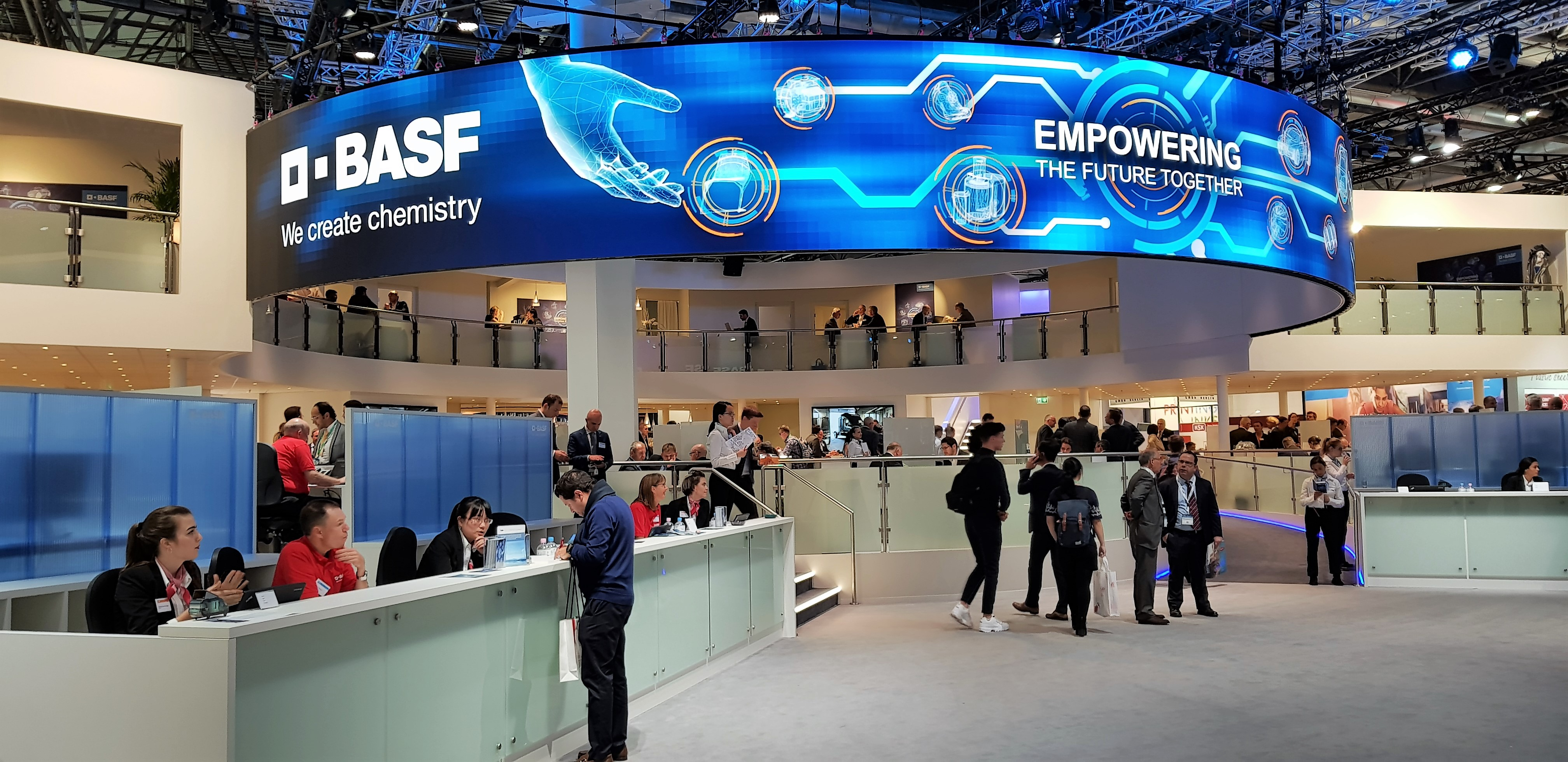 Stand von BASF auf der Kunststoffmesse K 2019 in Düsseldorf